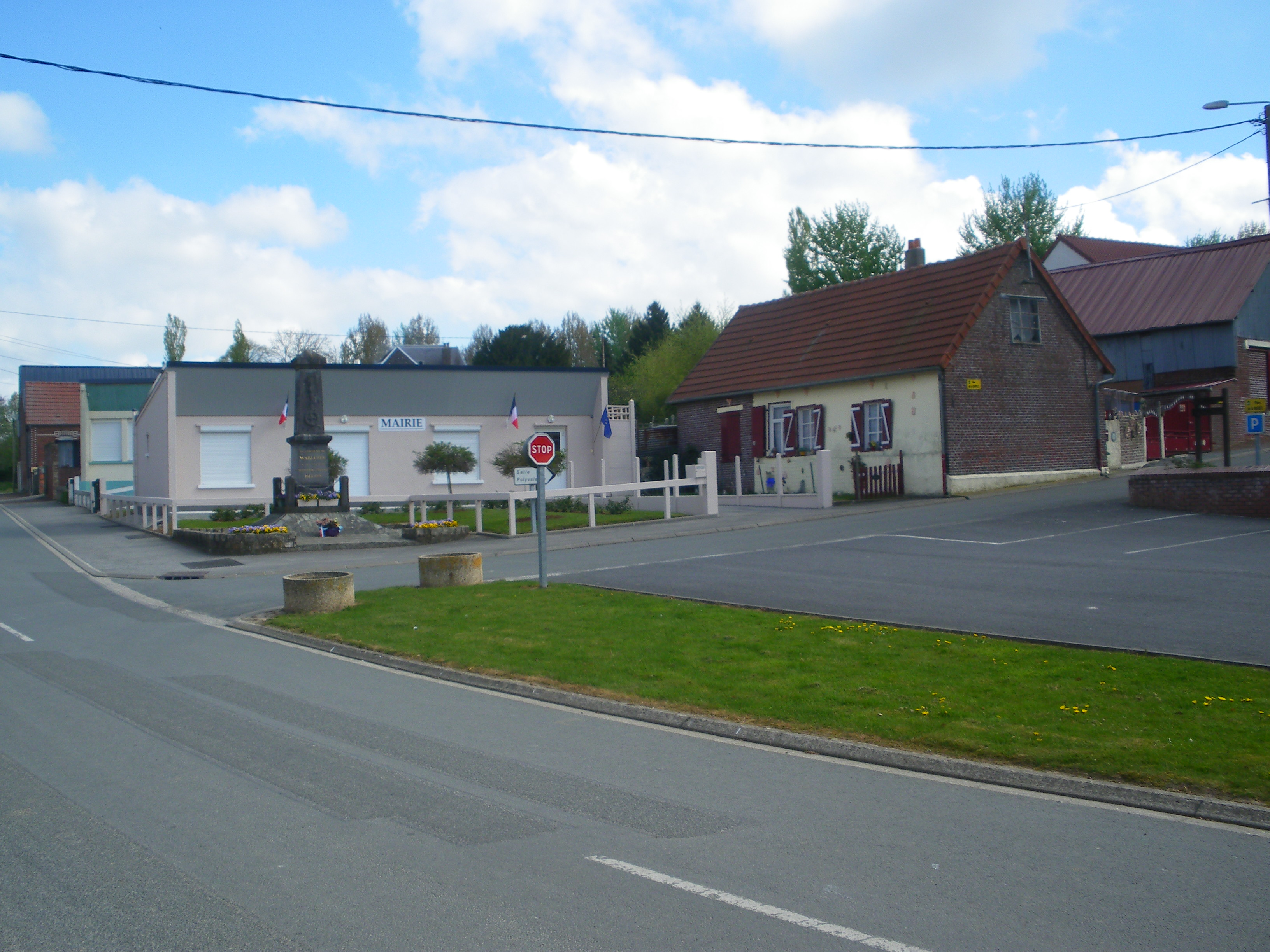 Centre de la commune de Warluzel : se distinguent le monument aux morts et la mairie.